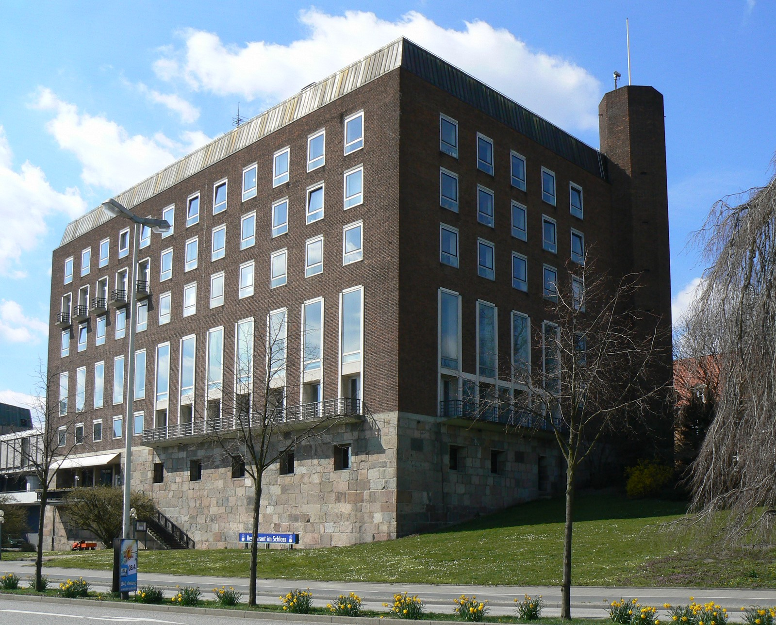 Kieler Schloss (Neubau). Blick von der Wassersseite (Osten).